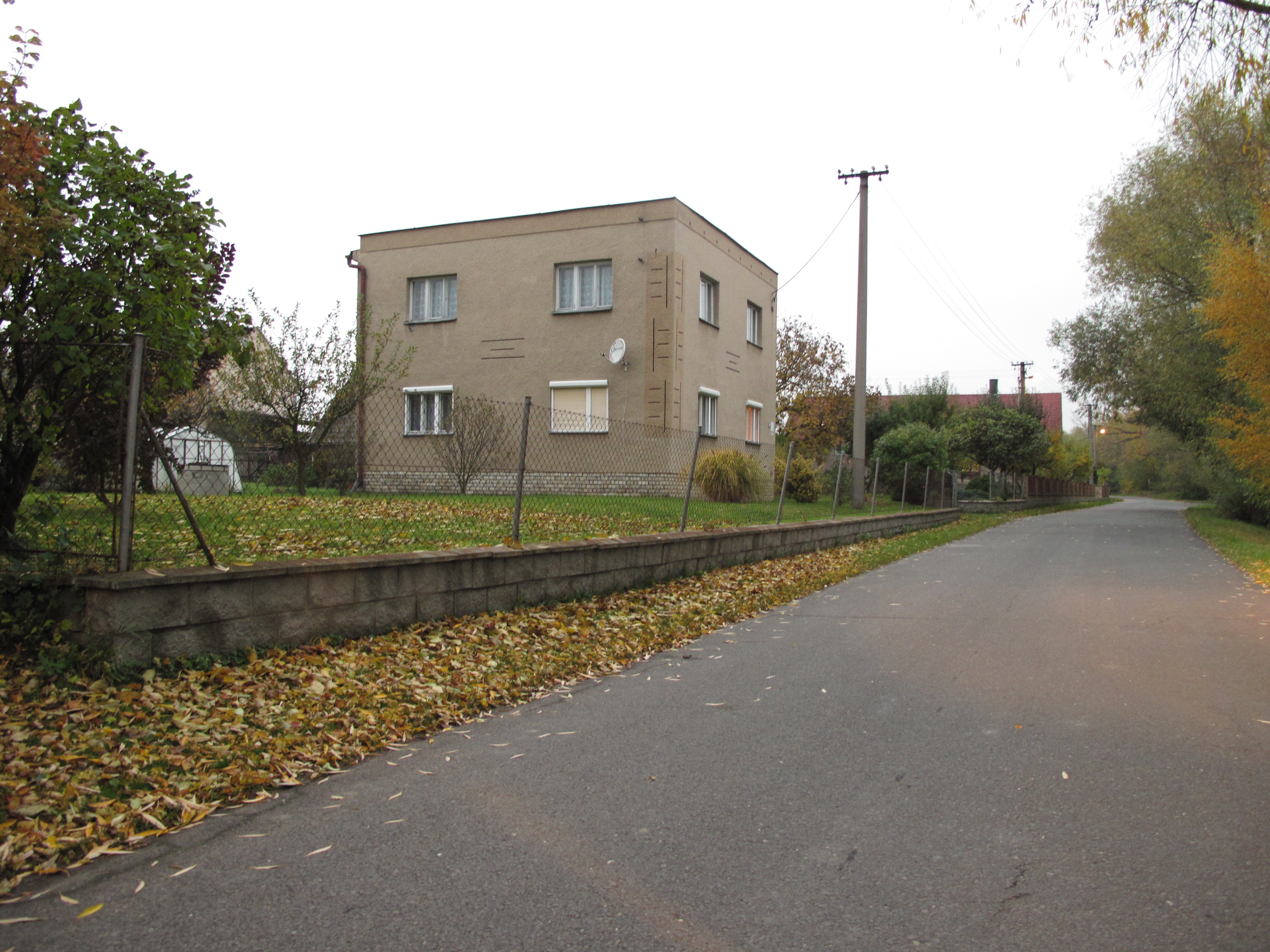 Opavice (Město Albrechtice). Okres Bruntál, Česká republika.